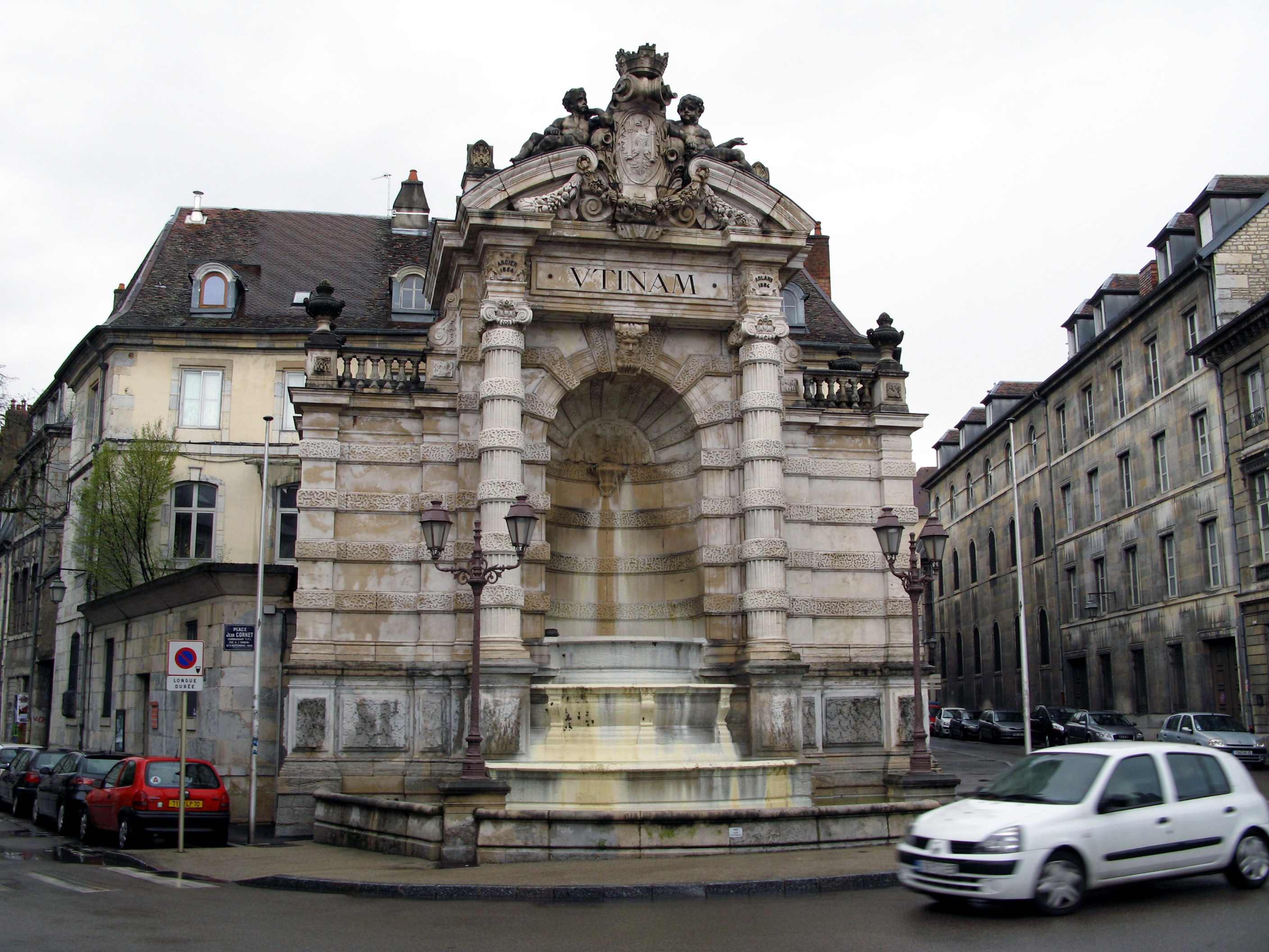 Besançon (Doubs, France) - La fontaine de la Place Jean Cornet. .